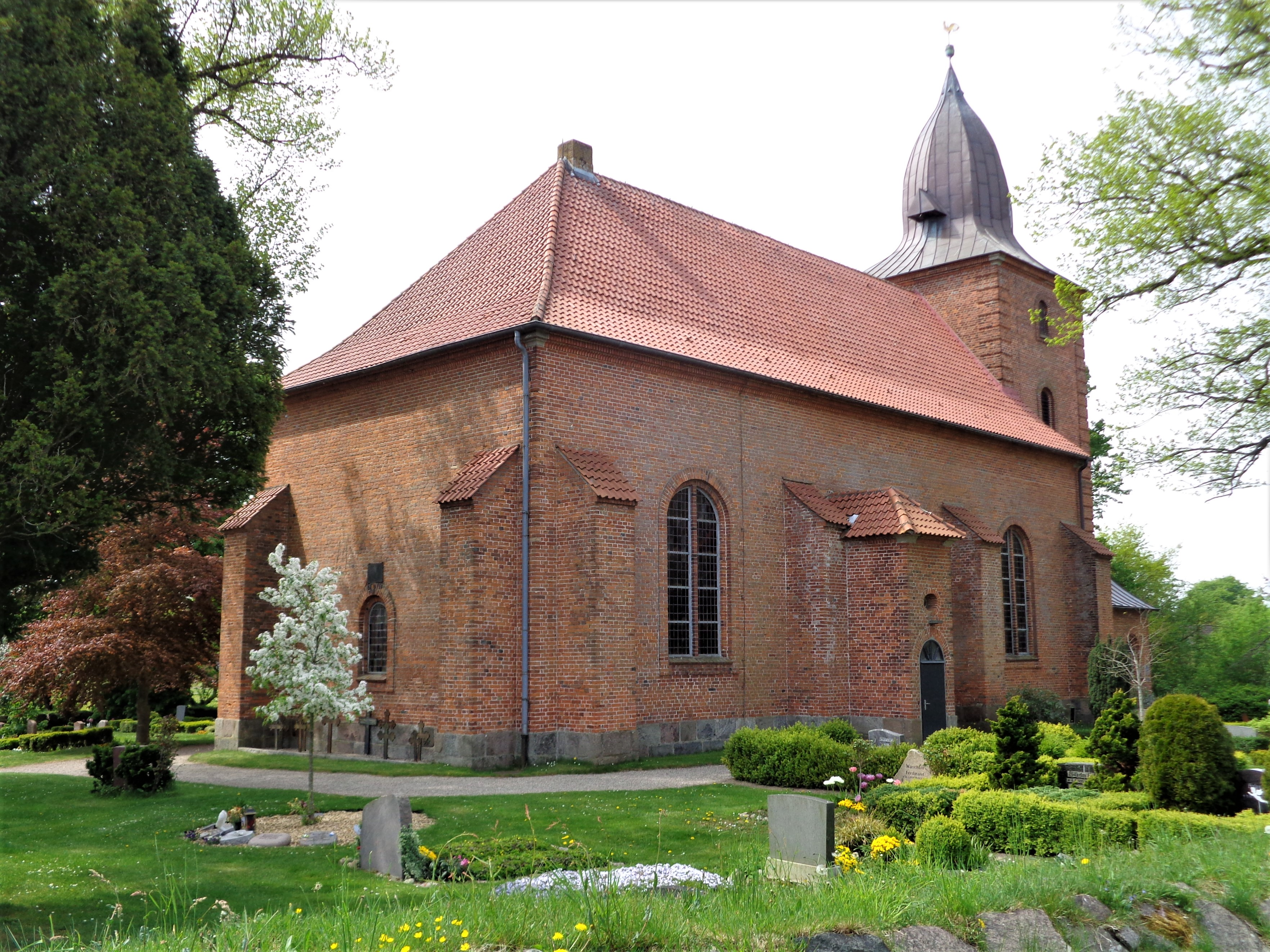 Die Dreifaltigkeitskirche (alias St. Trinitatiskirche) in Krusendorf (zu Schwedeneck) wurde 1733-35 gebaut und 1737 eingeweiht.